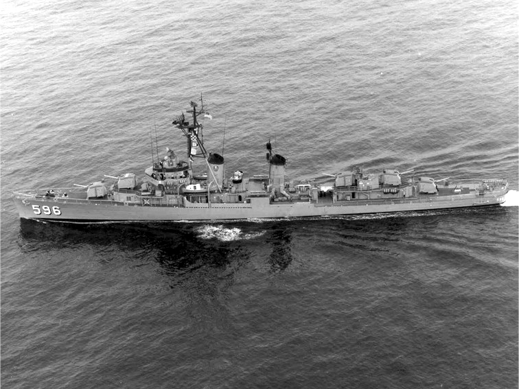 The U.S. Navy destroyer USS Shields (DD-596) underway.